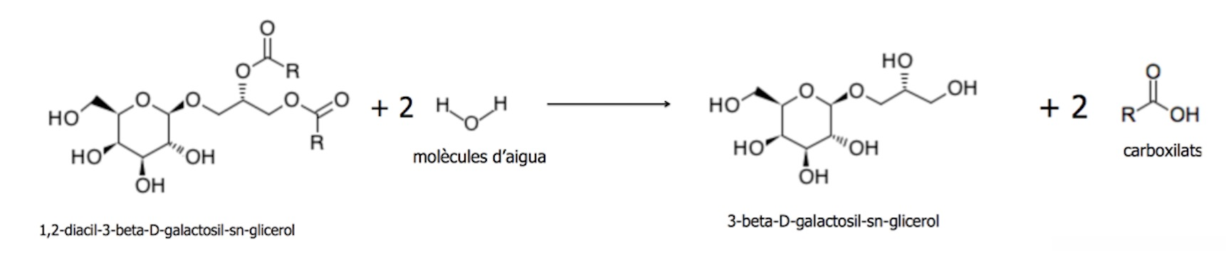 PNLIPRP2